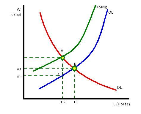 Com afecten els sindicats a la decisió dels salaris